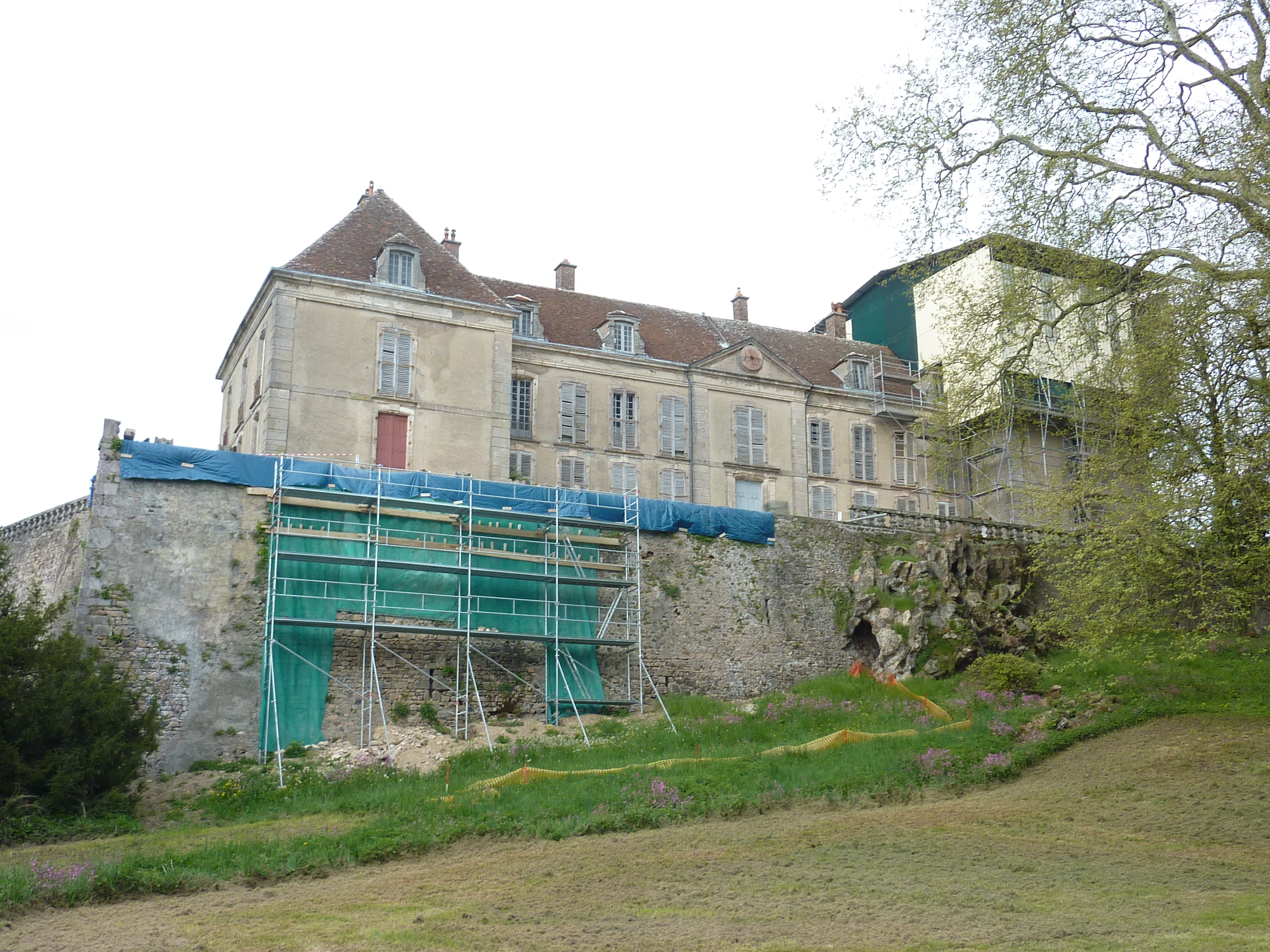 Le château de Larochemillay (Nièvre)